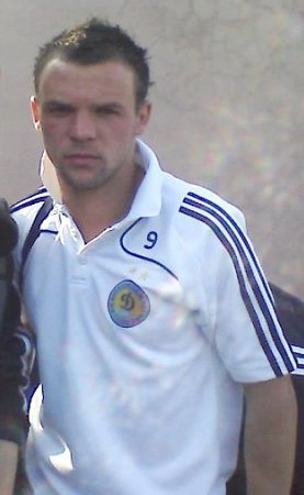 Николай Морозюк